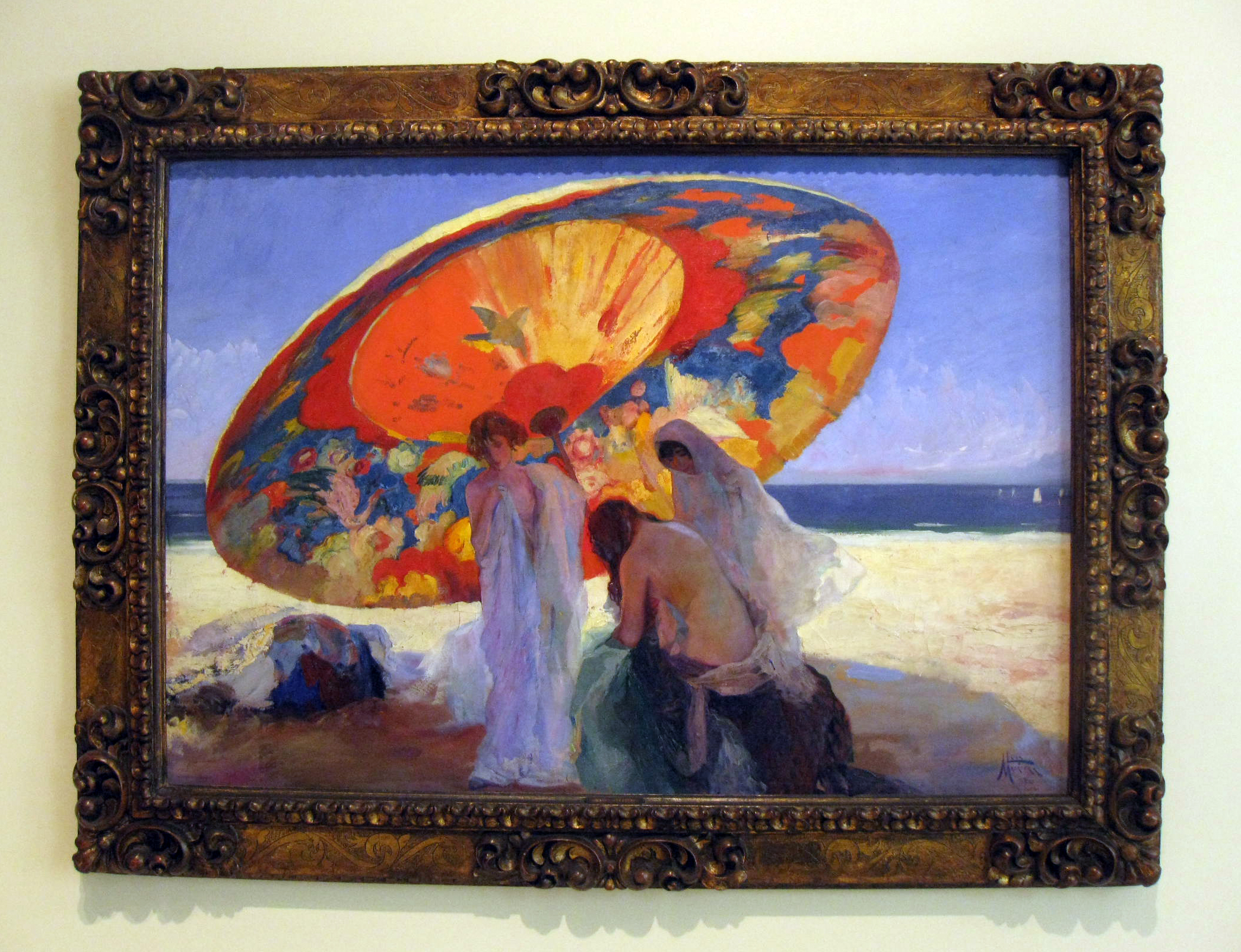 Catalan: Ombres Projectadestitle QS:P1476,ca:"Ombres Projectades" label QS:Lca,"Ombres Projectades"